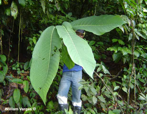 Passiflora macrophylla Spruce ex Mast. (Subgénero Astrophea). Especie distribuida en el Chocó biogeográfico de Colombia y Ecuador. Fotografía tomada en Guapi en el departamento del Cauca (Colombia)